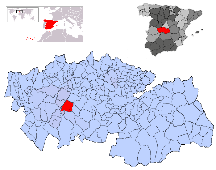 San Martín de Pusa en la provincia de Toledo